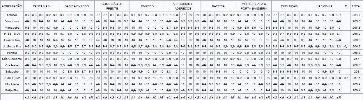 Resultados do Carnaval do Rio em 2020 - Grupo Especial